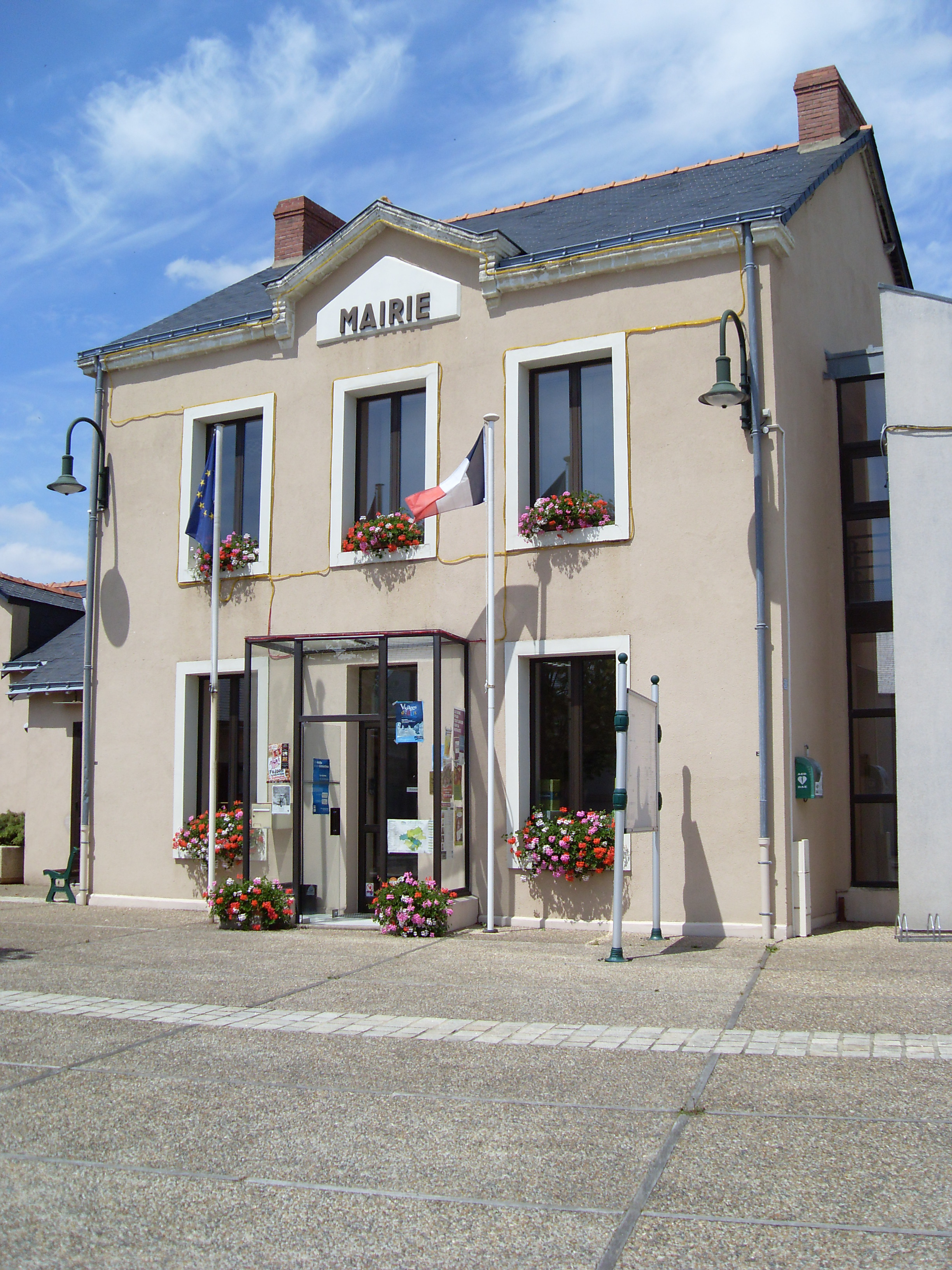 Mairie de Lusanger